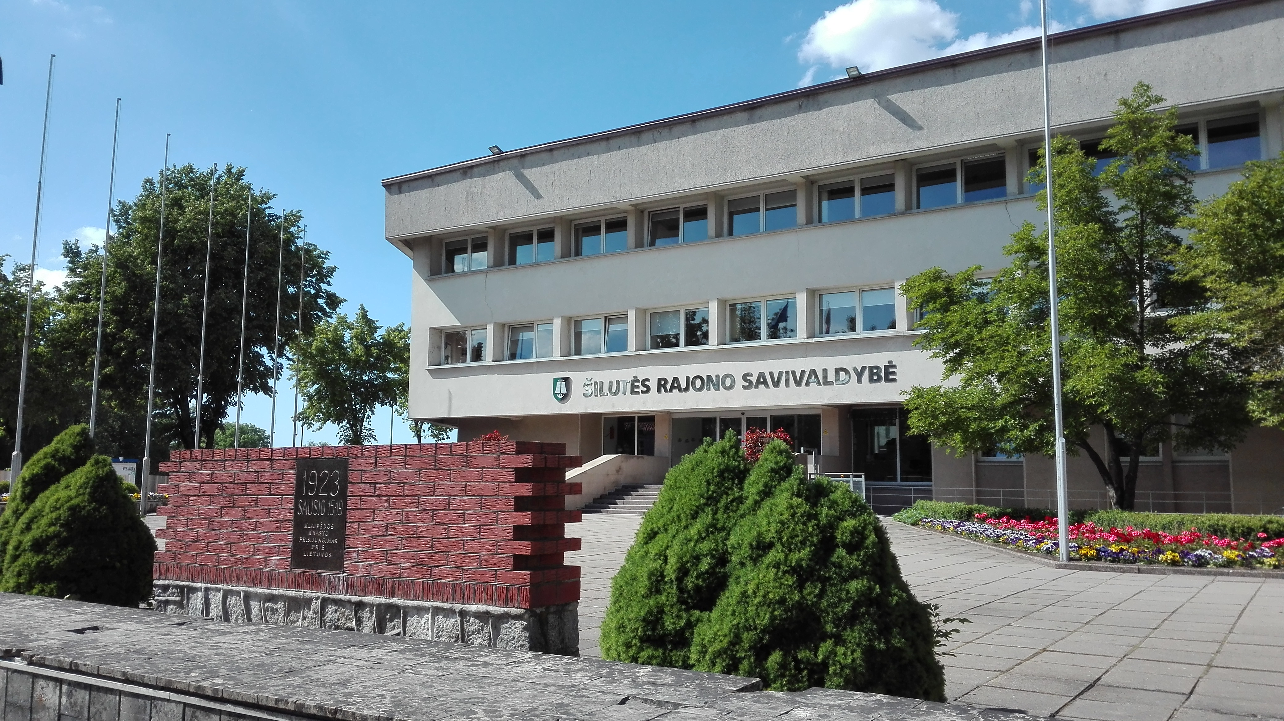 Šilutės rajono savivaldybė